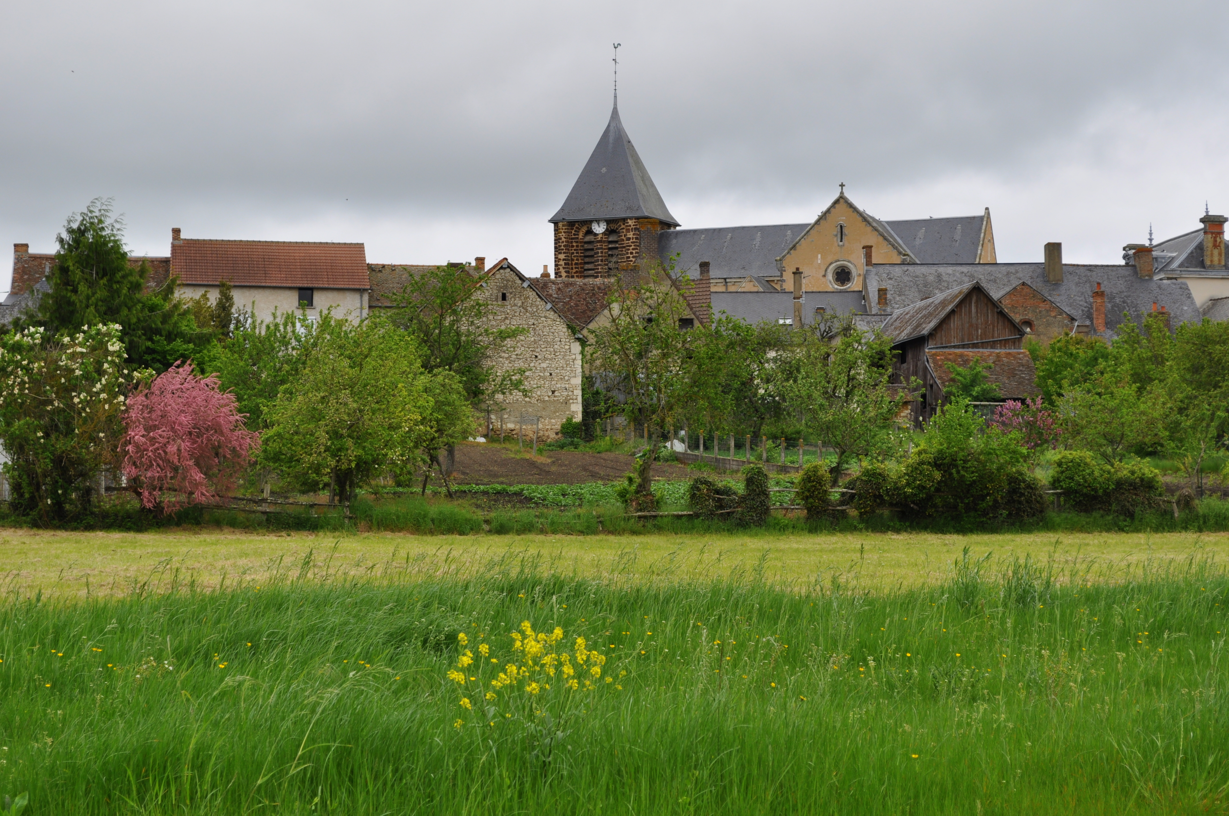 Vue générale d'Yvré-le-Pôlin (Sarthe)